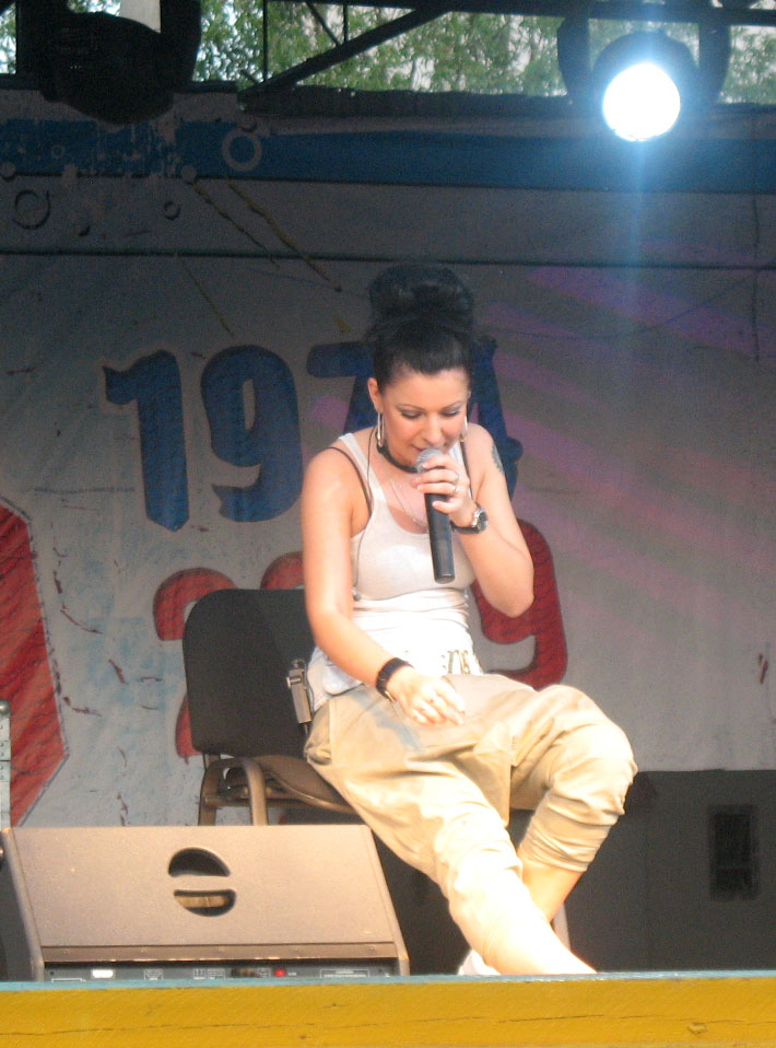 фото певицы Ёлки